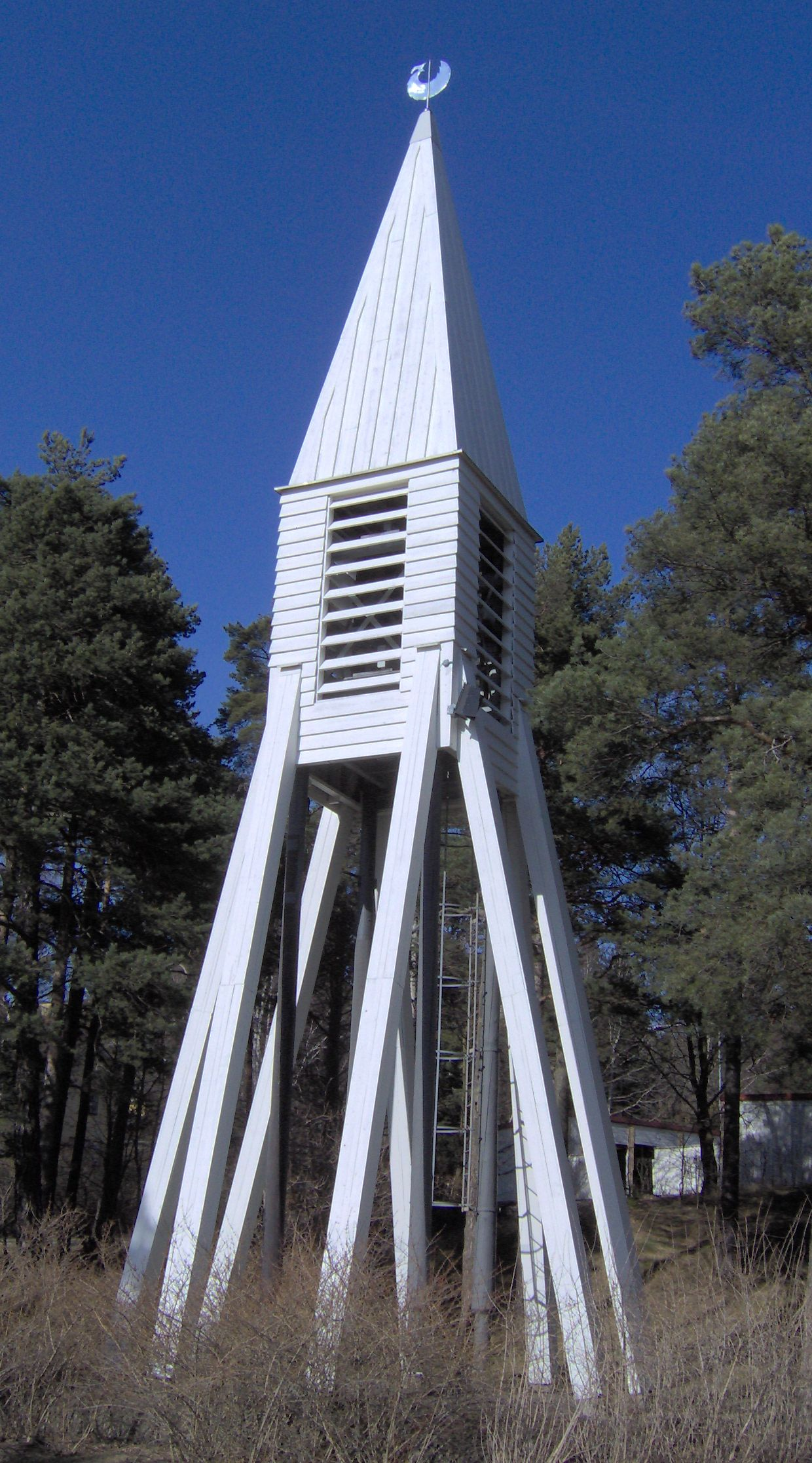 Klockstapeln vid Alla Helgons kyrka i Östertälje i Södertälje kommun.